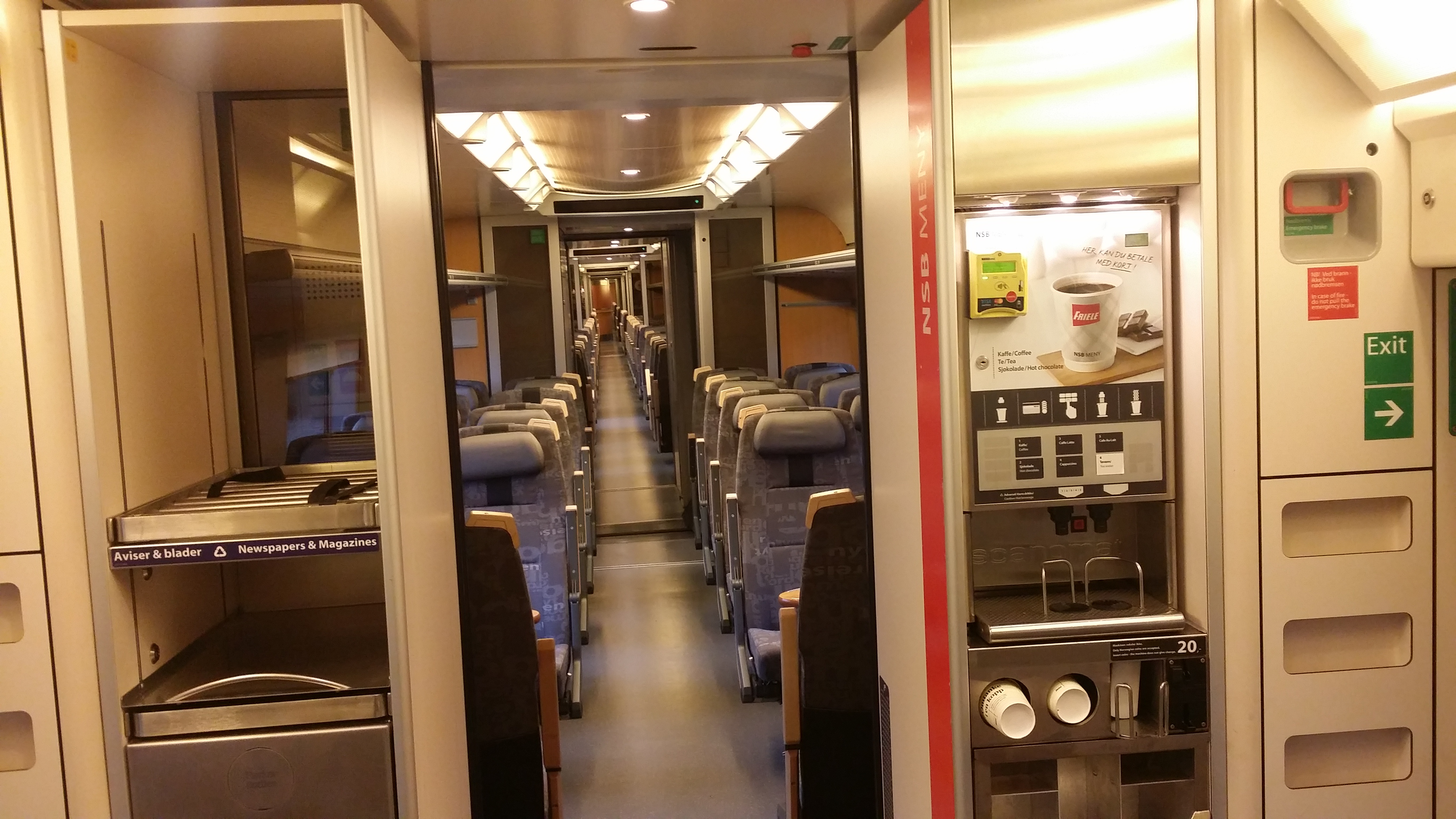 Interiøret i 73-44 etter oppussing og montering av nye seter. 73B hr serverings- og varmdrikkautomater.